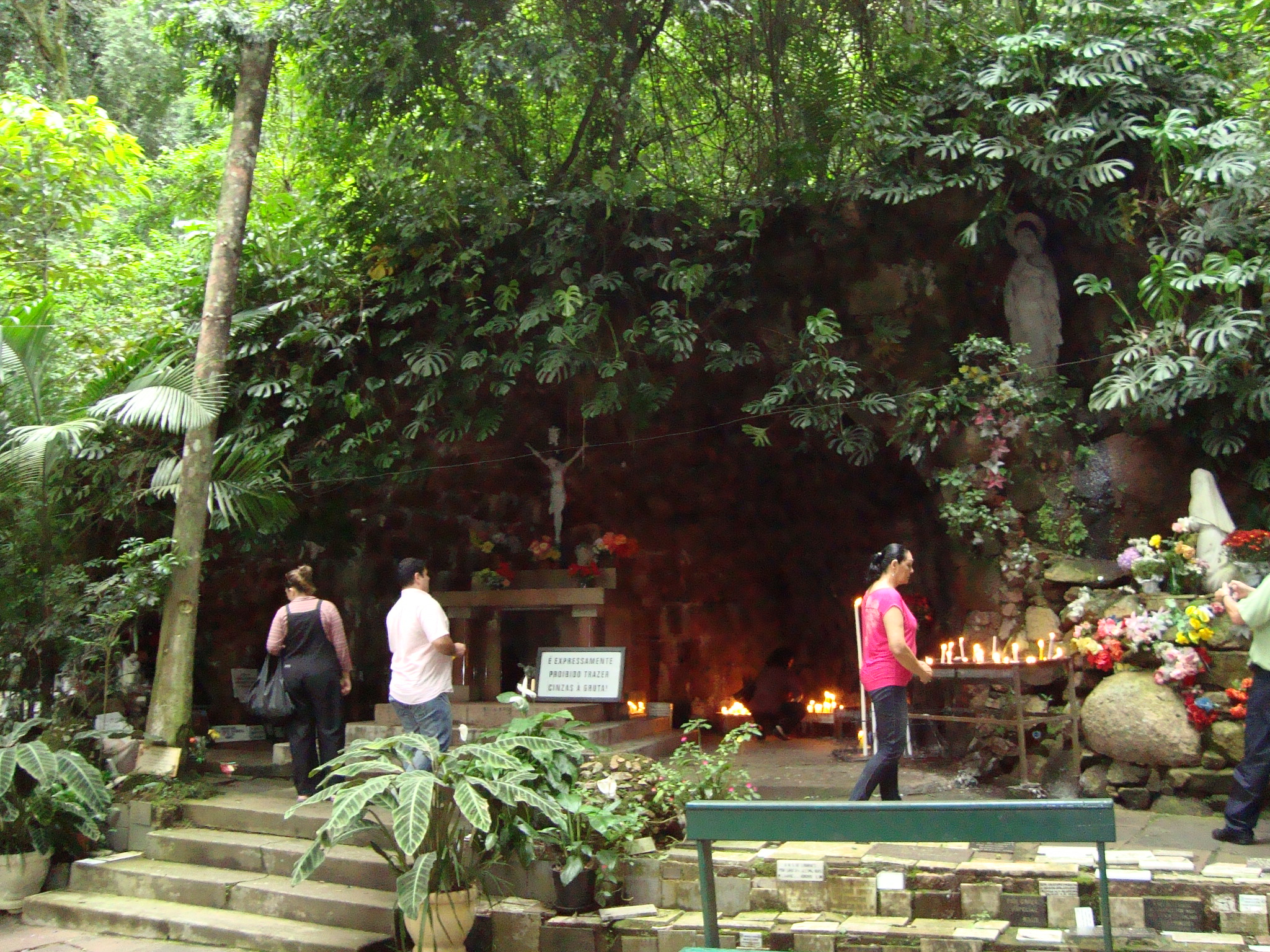 Gruta de Nossa Senhora de Lourdes, Porto Alegre, Rio Grande do Sul, Brasil